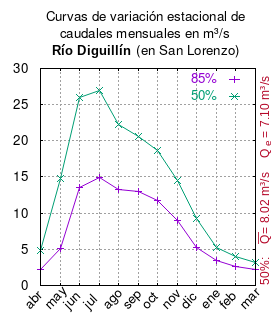 Curvas de variación estacional del río Diguillín en San Lorenzo. # Comisión Nacional de Riego # DIAGNÓSTICO ACTUAL DEL RIEGO Y DRENAJE EN CHILE Y SU PROYECCIÓN. Informe final.Diagnóstico de riego y drenaje VIII Región, Anexo 1 # Santiago de Chile # Febrero 2003 # url: # CUADRO 2.5-1 RIO DIGUILLlN EN SAN LORENZO mes 85% 50% abr 2.19 4.81 may 5.14 14.75 jun 13.53 25.99 jul 14.93 26.89 ago 13.21 22.30 sep 13.01 20.56 oct 11.72 18.61 nov 8.95 14.47 dic 5.24 9.33 ene 3.46 5.26 feb 2.67 3.96 mar 2.20 3.22